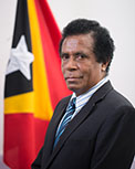 Fausto Freitas da Silva